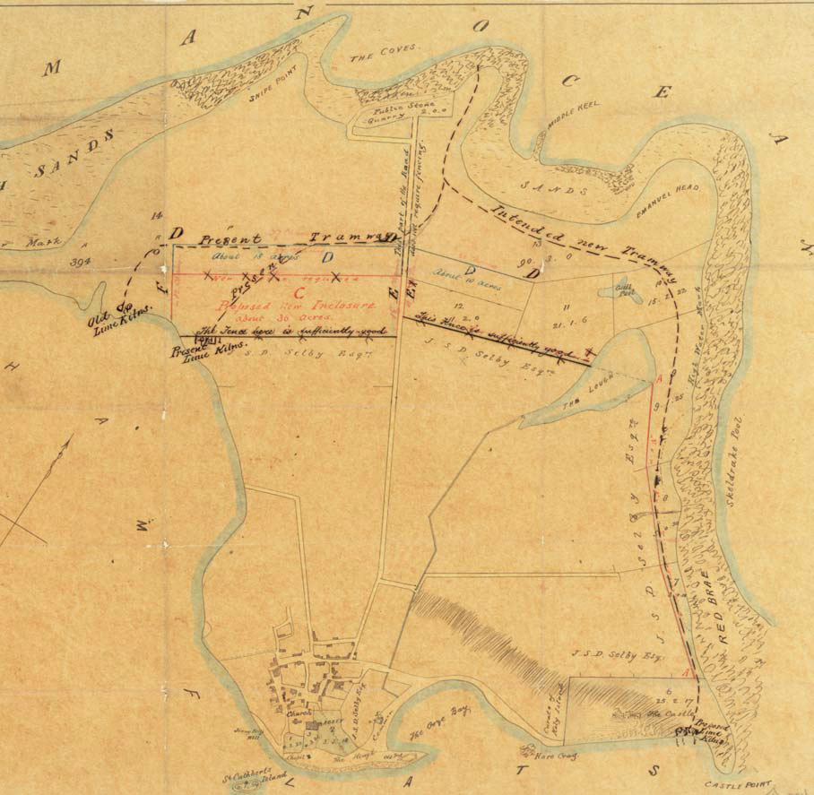 John Higgins’ map of 1860 showing the proposed Castle Point Lime workings. The National Archives. From Addyman Archaeology 2009, 9